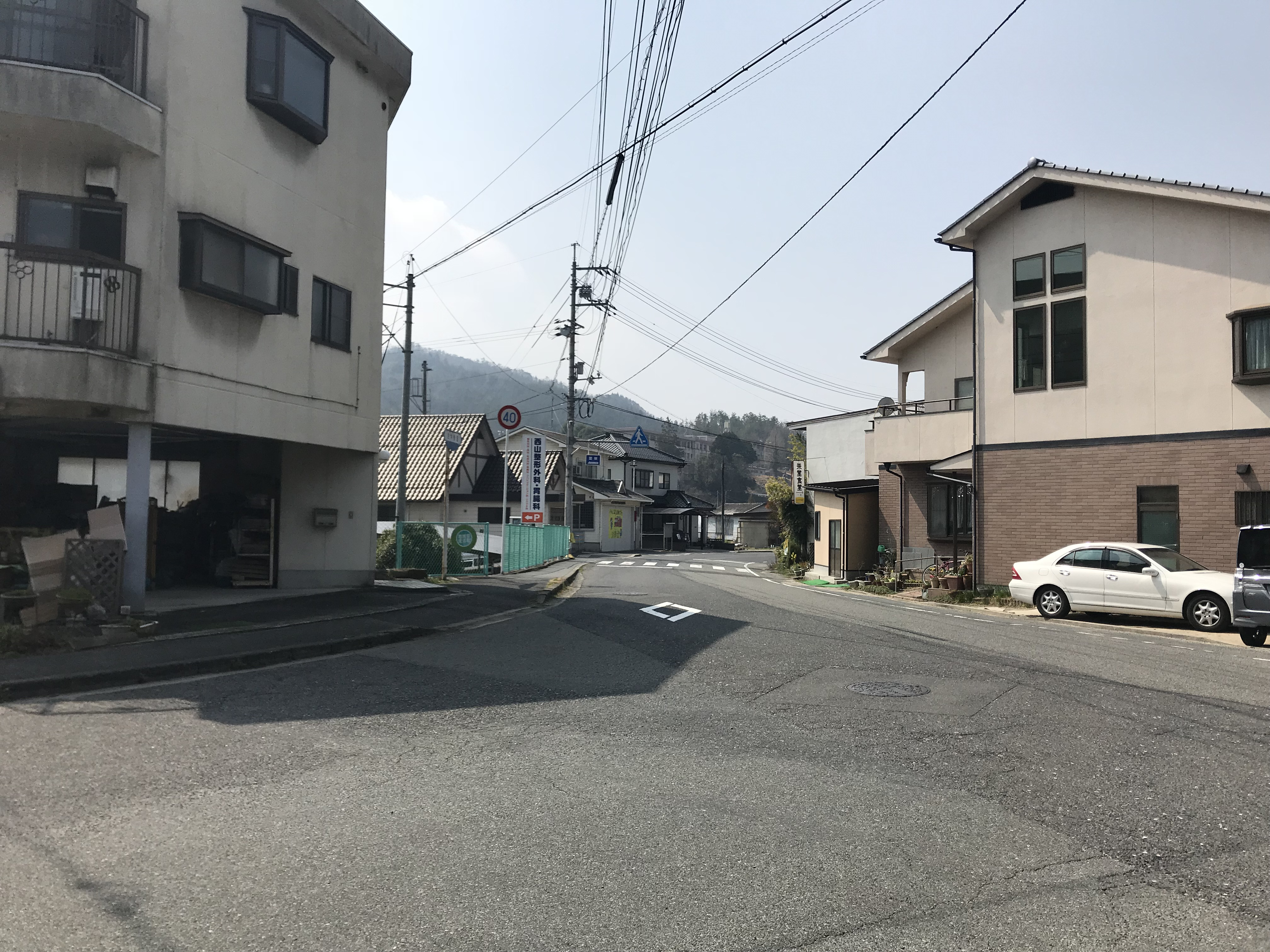 志和口踏切西側のストリートビュー。奥は白木街道